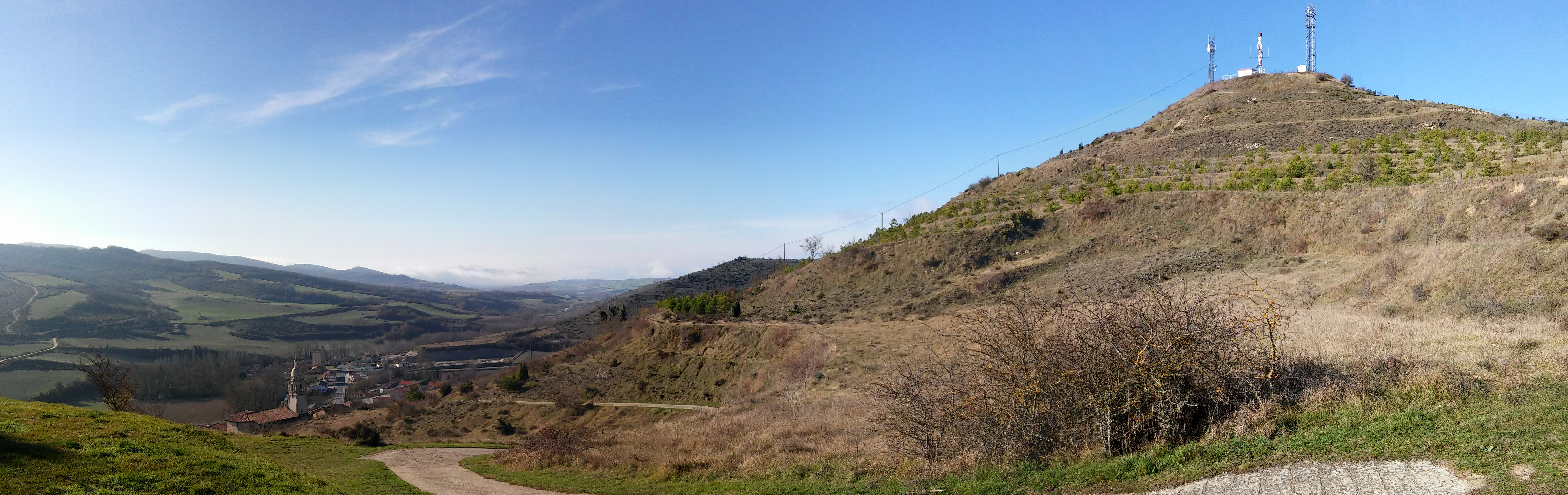 Trebiñuko Cerro mendia